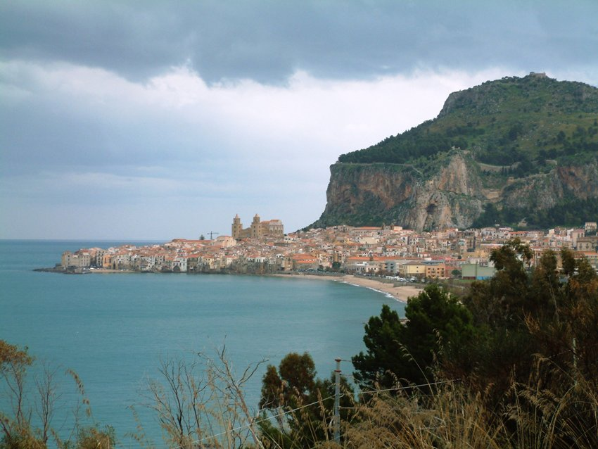 Panorama di Cefalù.